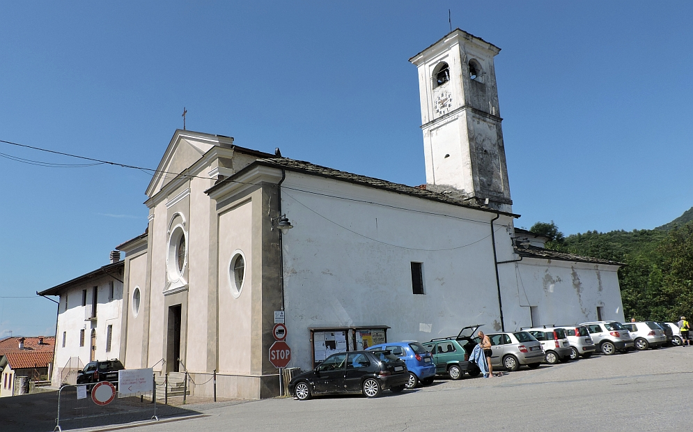 Colleretto Castelnuovo chiesa parrocchiale di Sant'Antonio abate